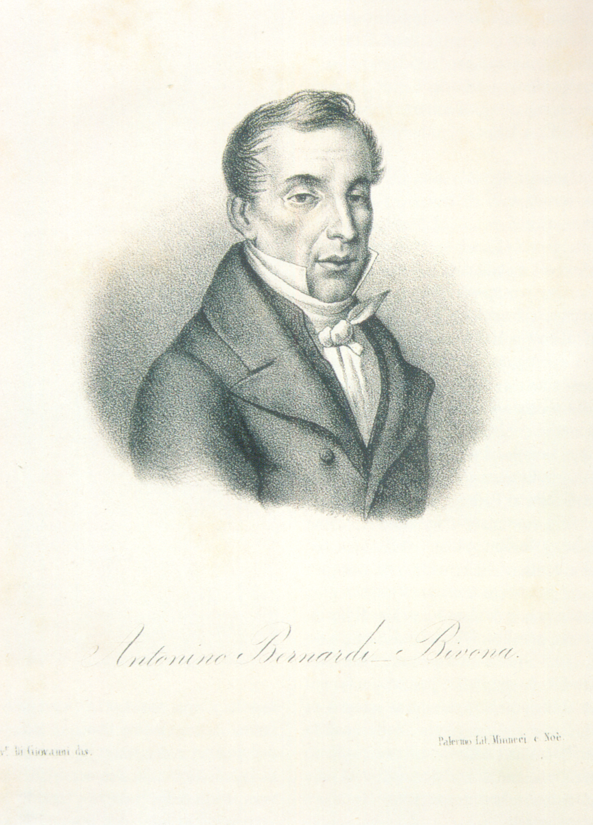 Antonino Bivona Bernardi (1770–1837)